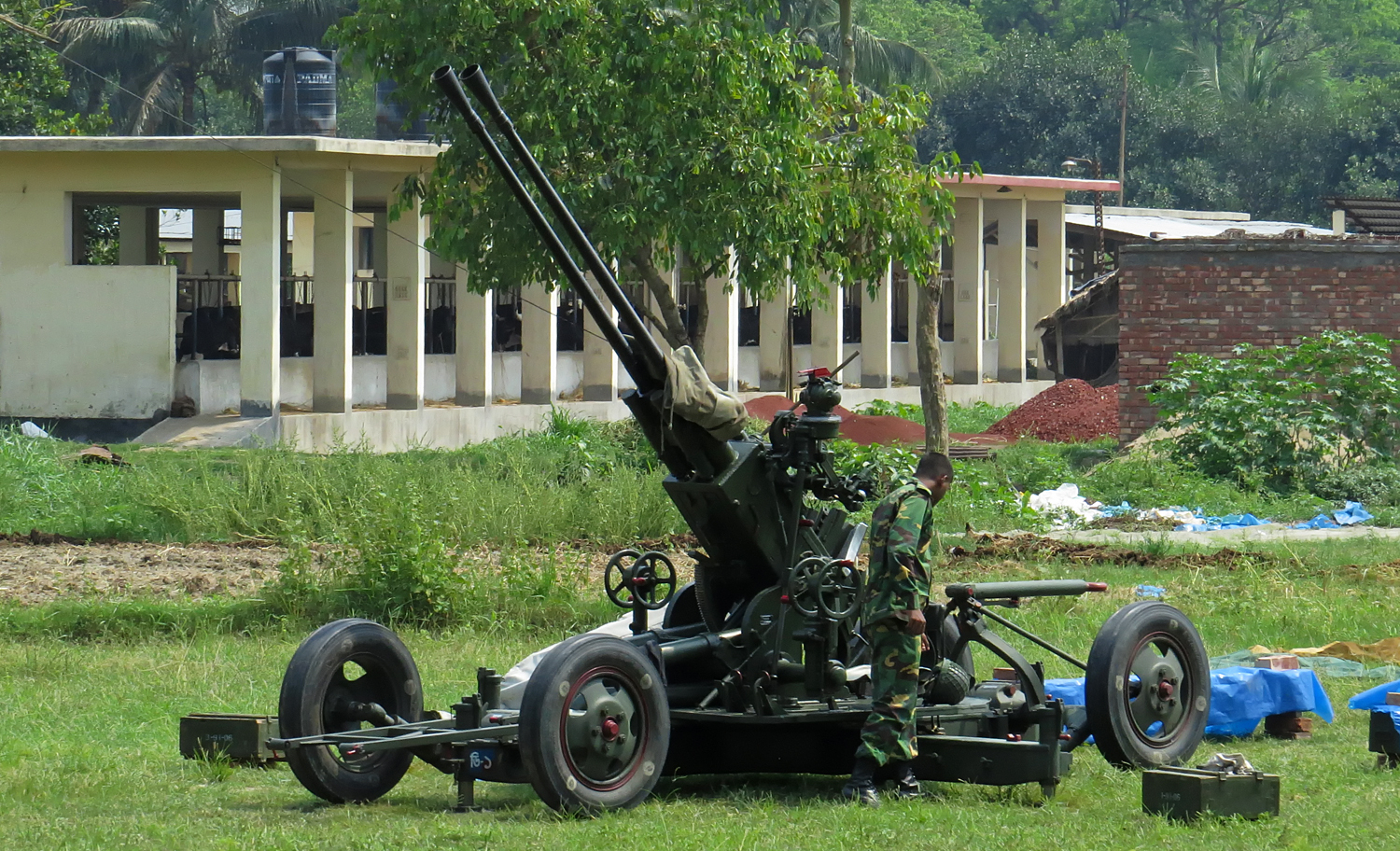 Jessore 2015.